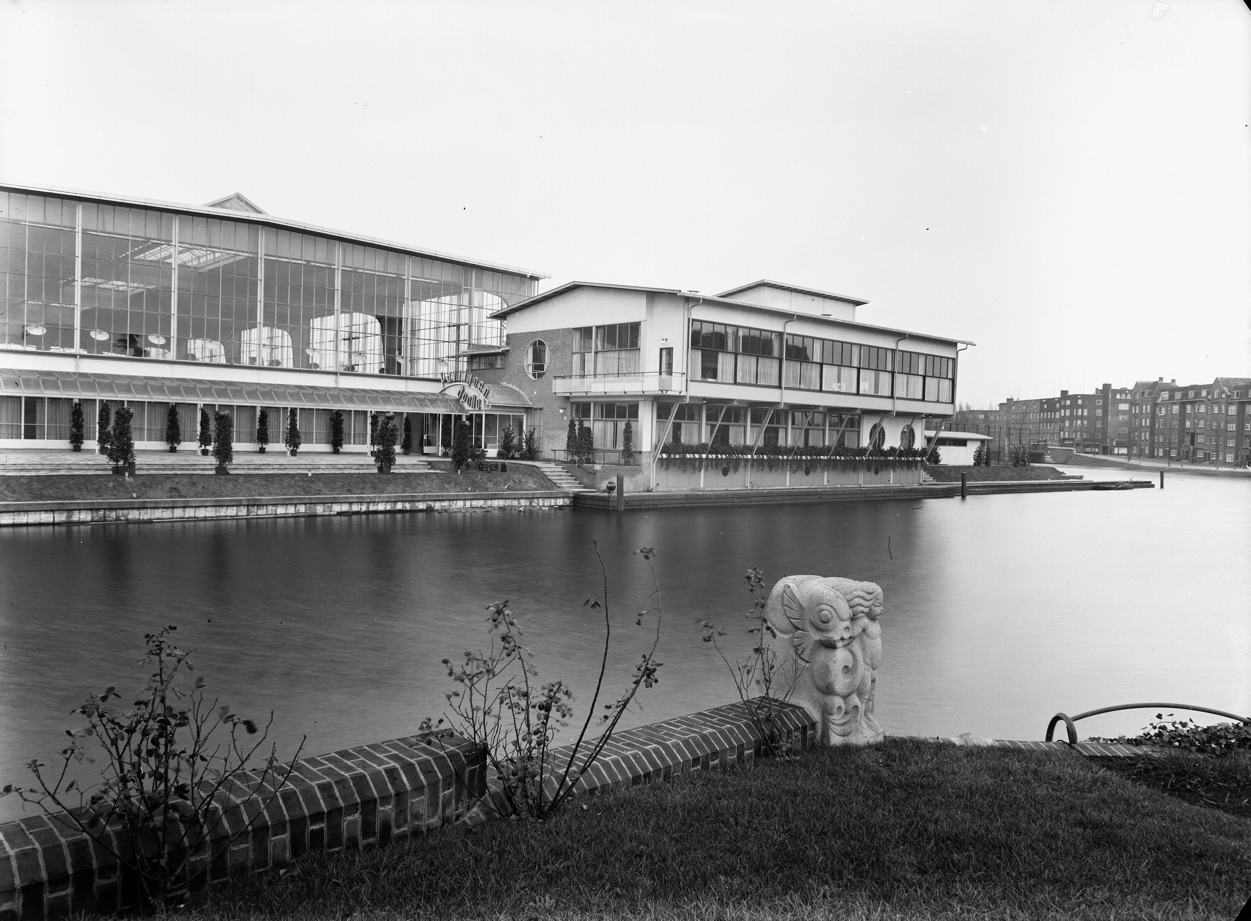 Apollolaan 2 Café-restaurant Paviljoen Apollo (later Apollo Paviljoen genoemd). Links een gedeelte van de zijkant van de Apollohal, Stadionweg 1-5. Op de voorgrond het Noorder Amstelkanaal.